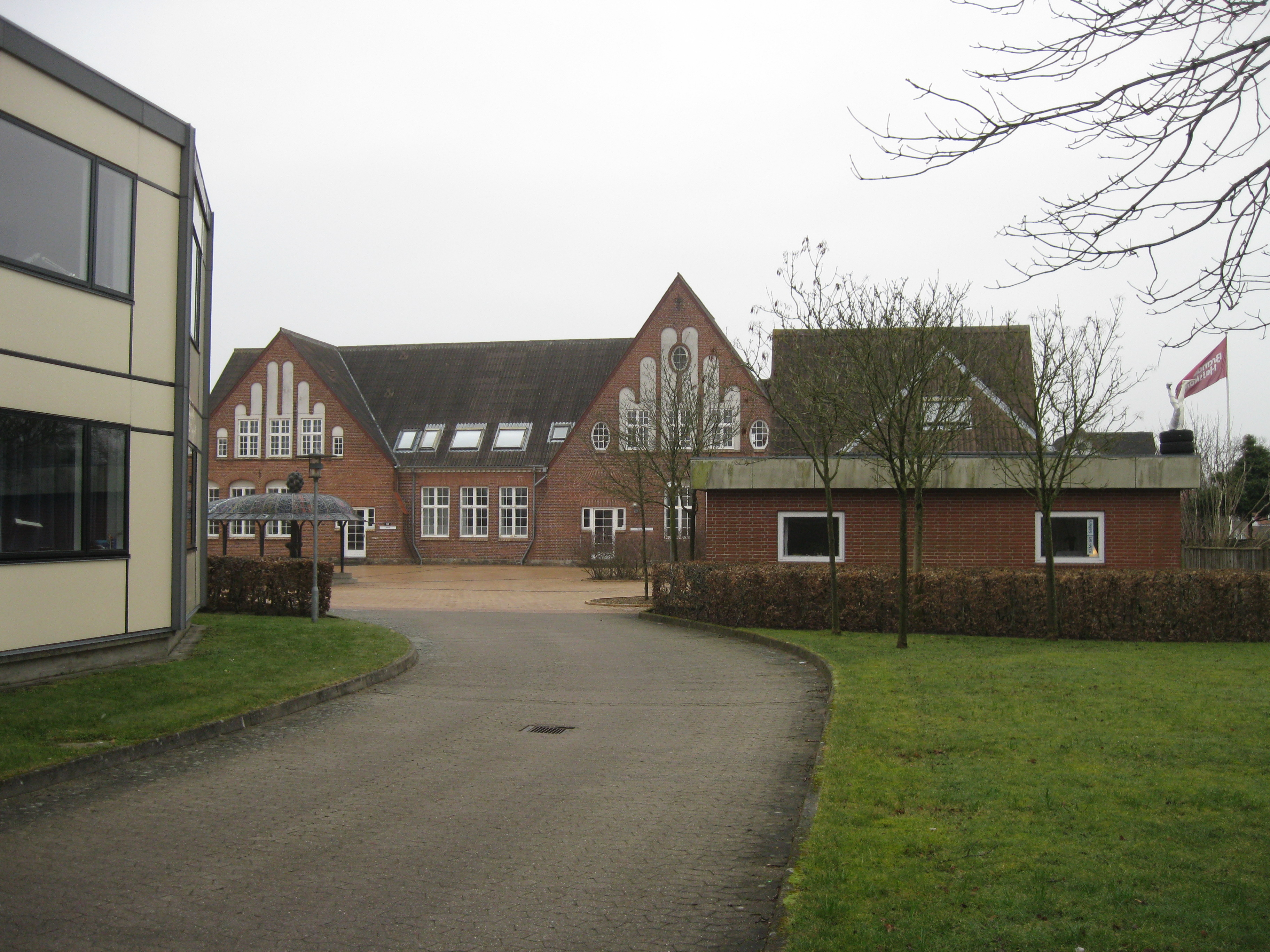 Brande Højskole